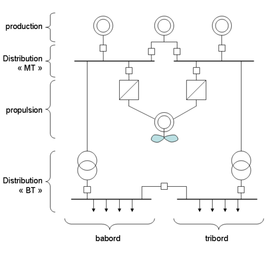 Réseau électrique typique d'un navire à propulsion électrique